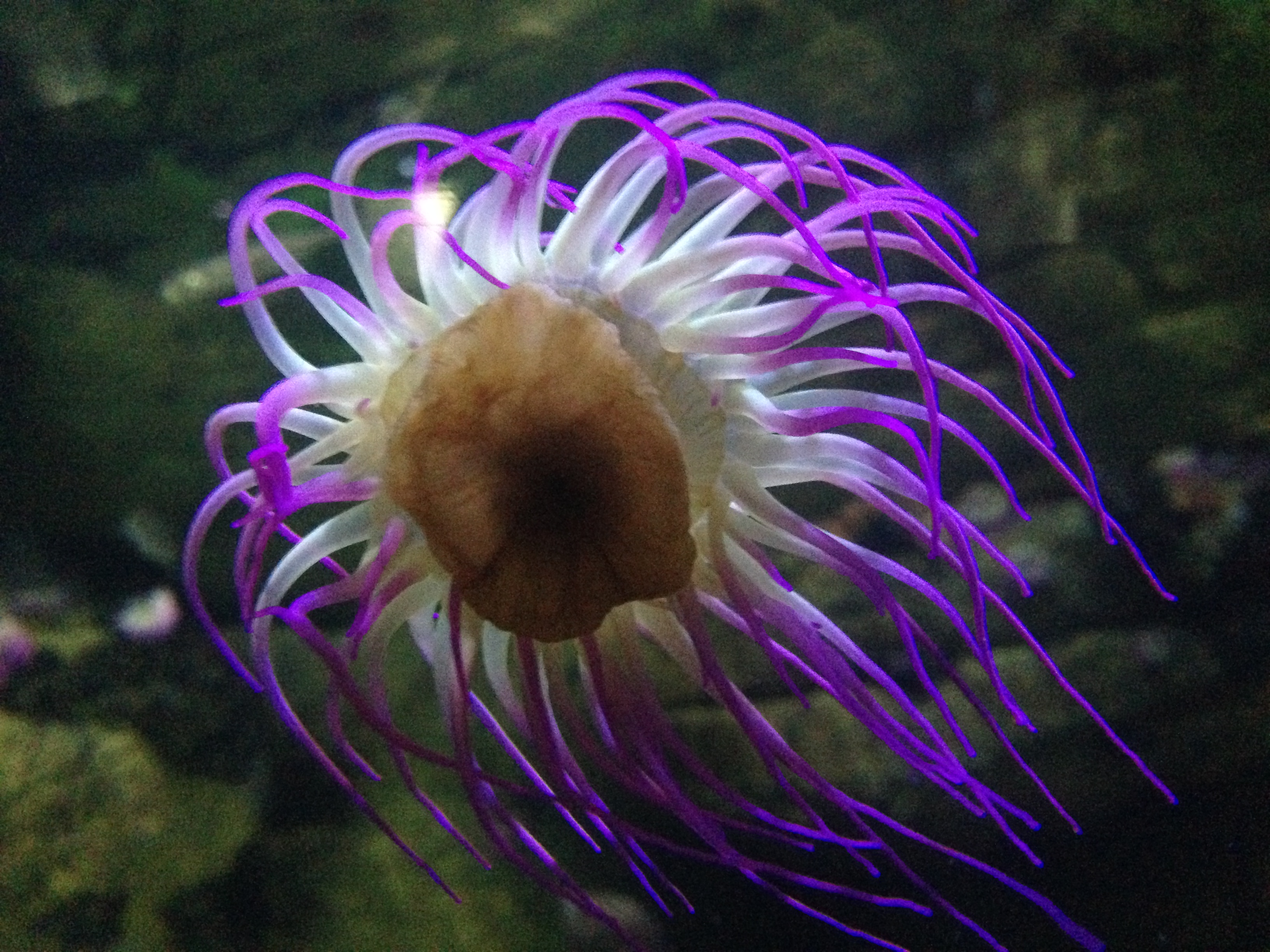 Anemonia viridis con el disco basal adherido al cristal de un Oceanarium.